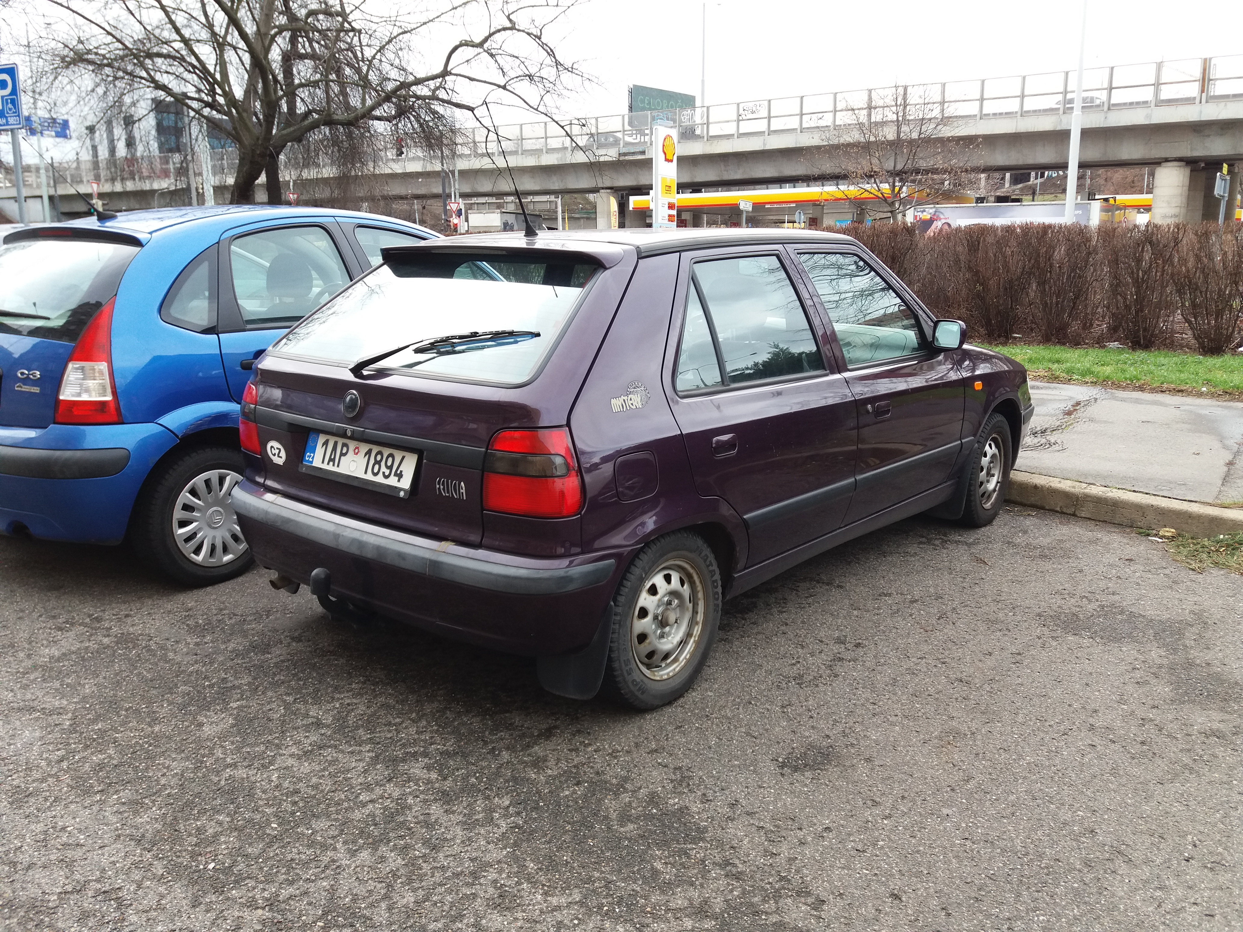 Automobil na pražské Balabence.